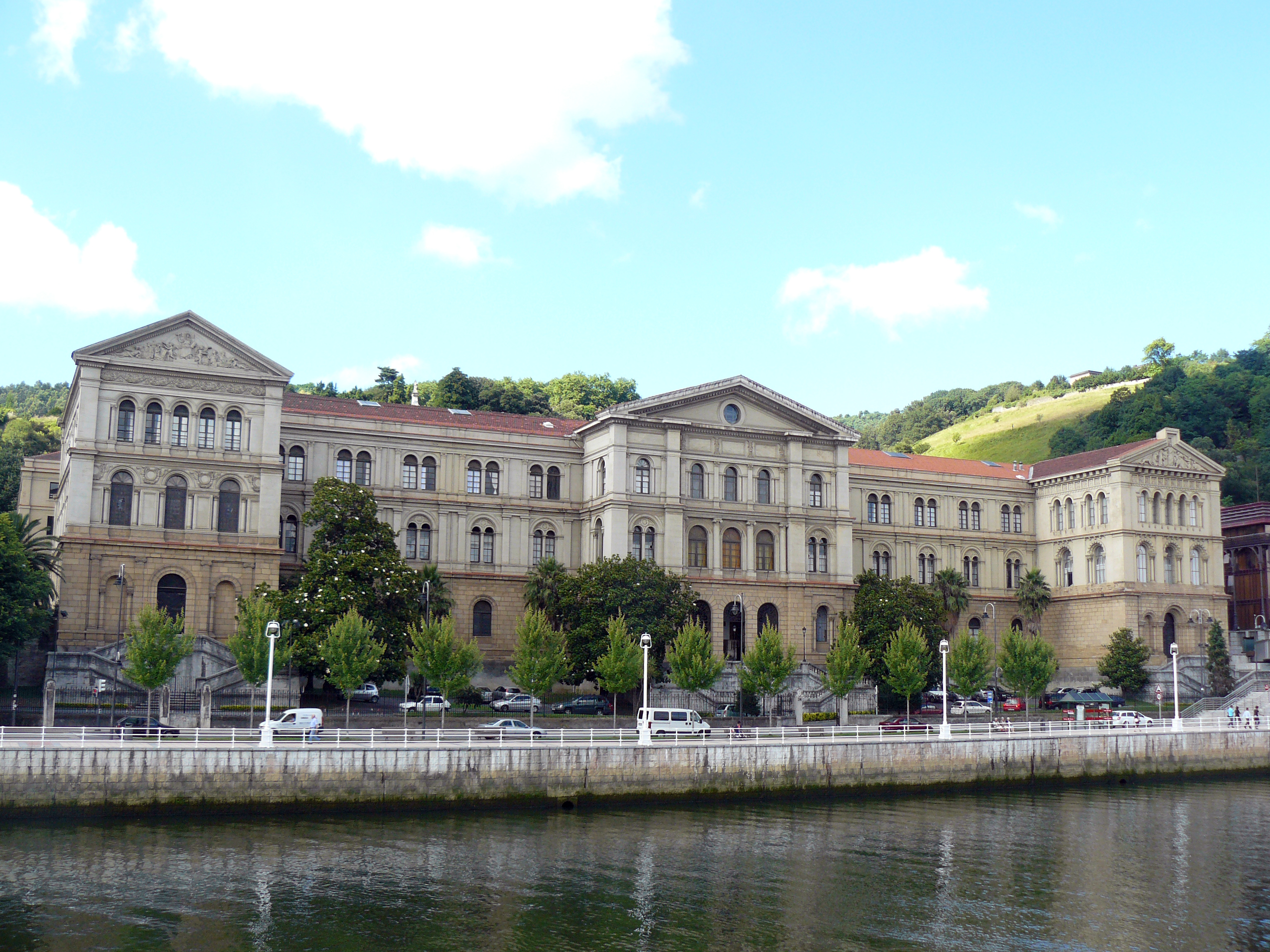 Universidad de Deusto, Bilbao, España.